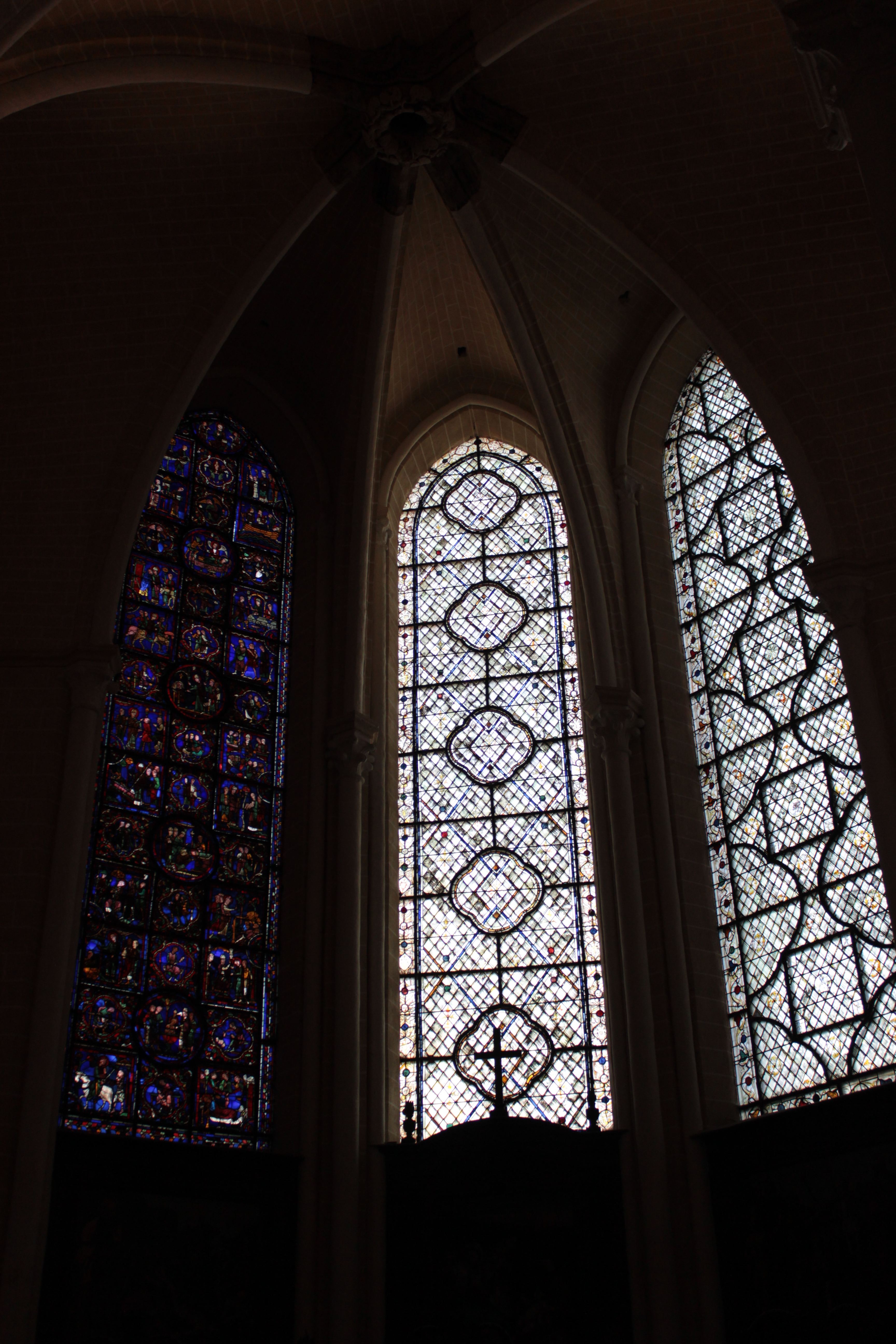 Vitrail de Chartres, Eure-et-Loir, France.